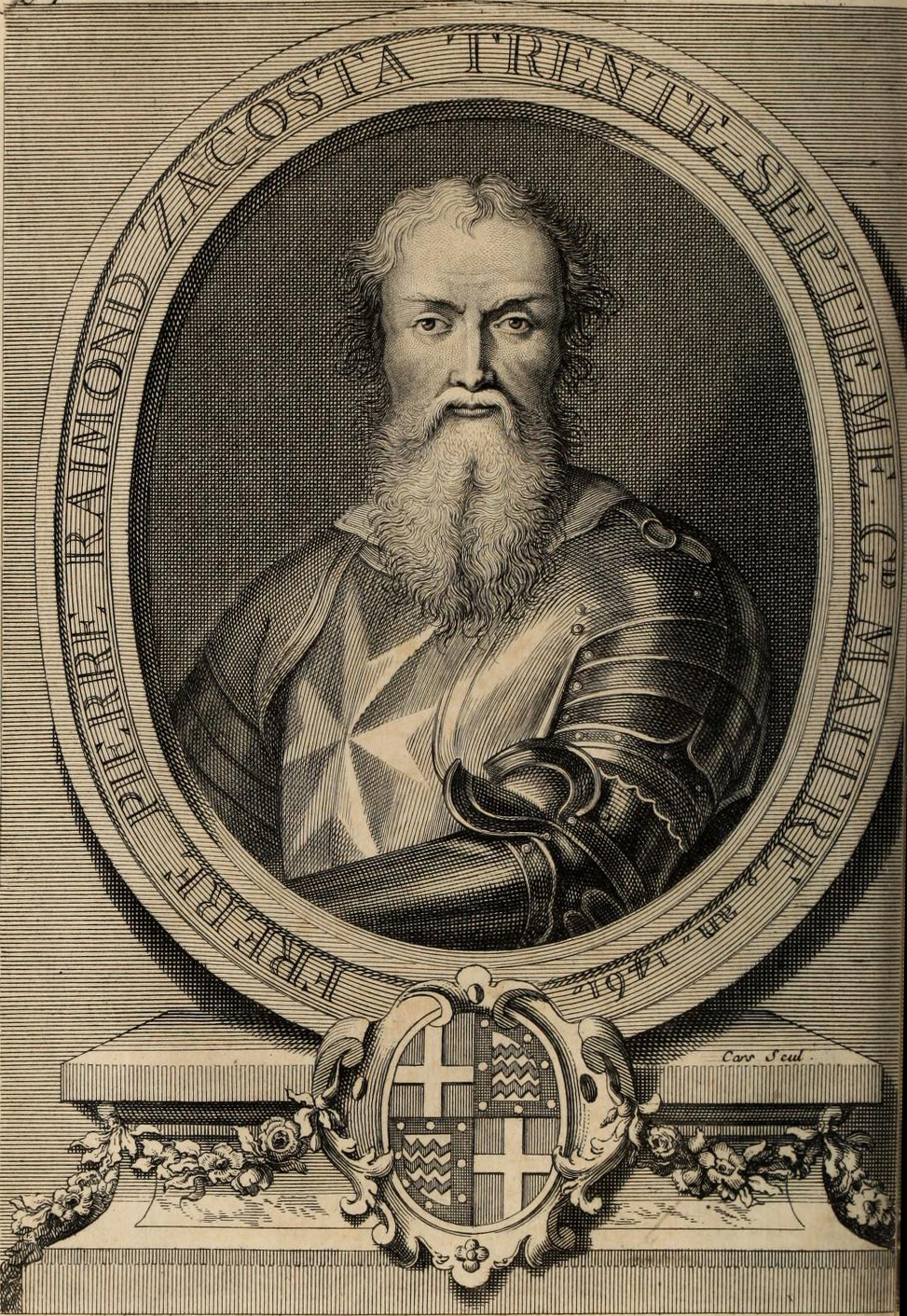 grand maître de l'ordre de Saint-Jean de Jérusalem